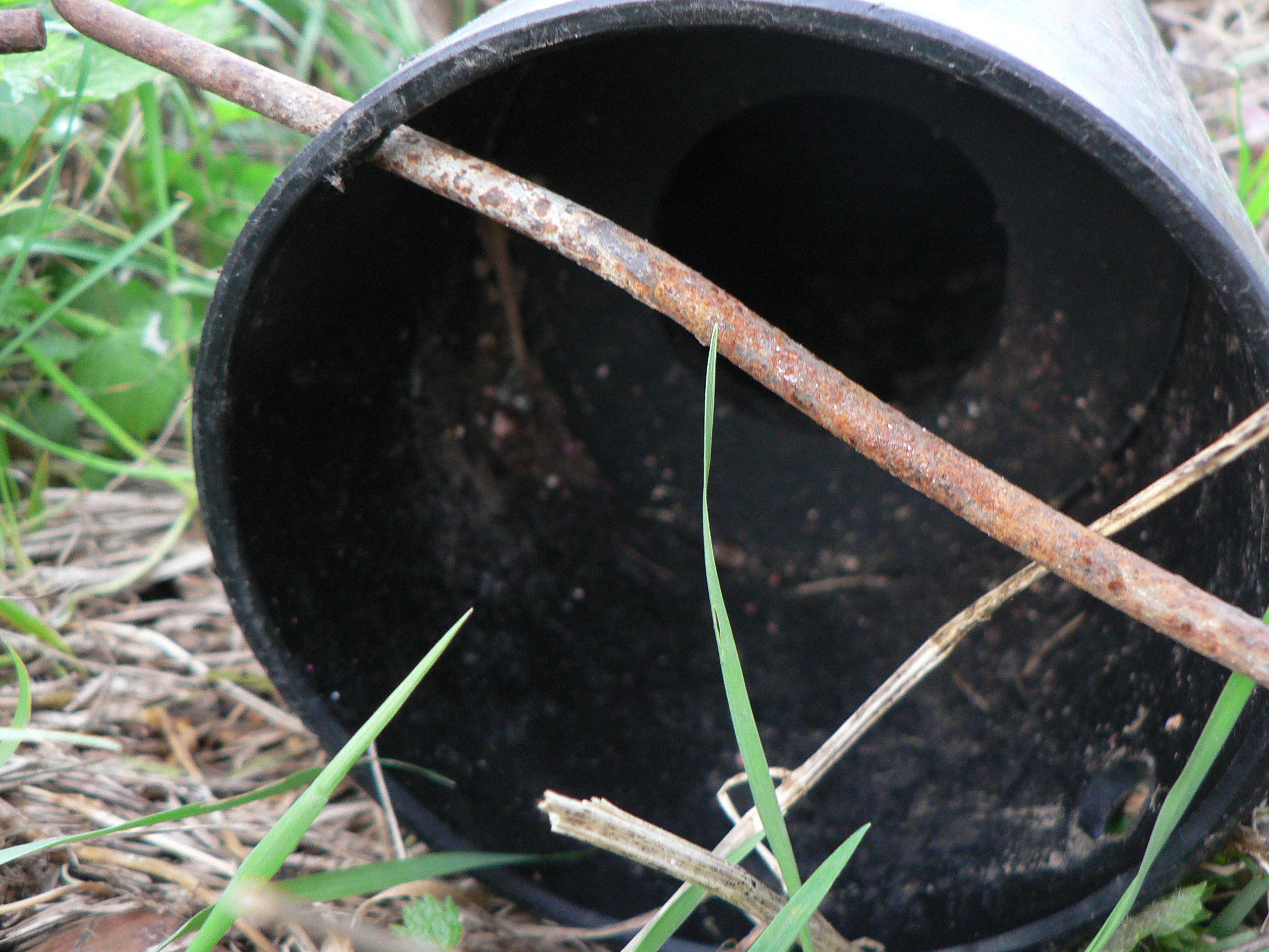 rat poison on the Schelde river dike, Steendorp, Belgium